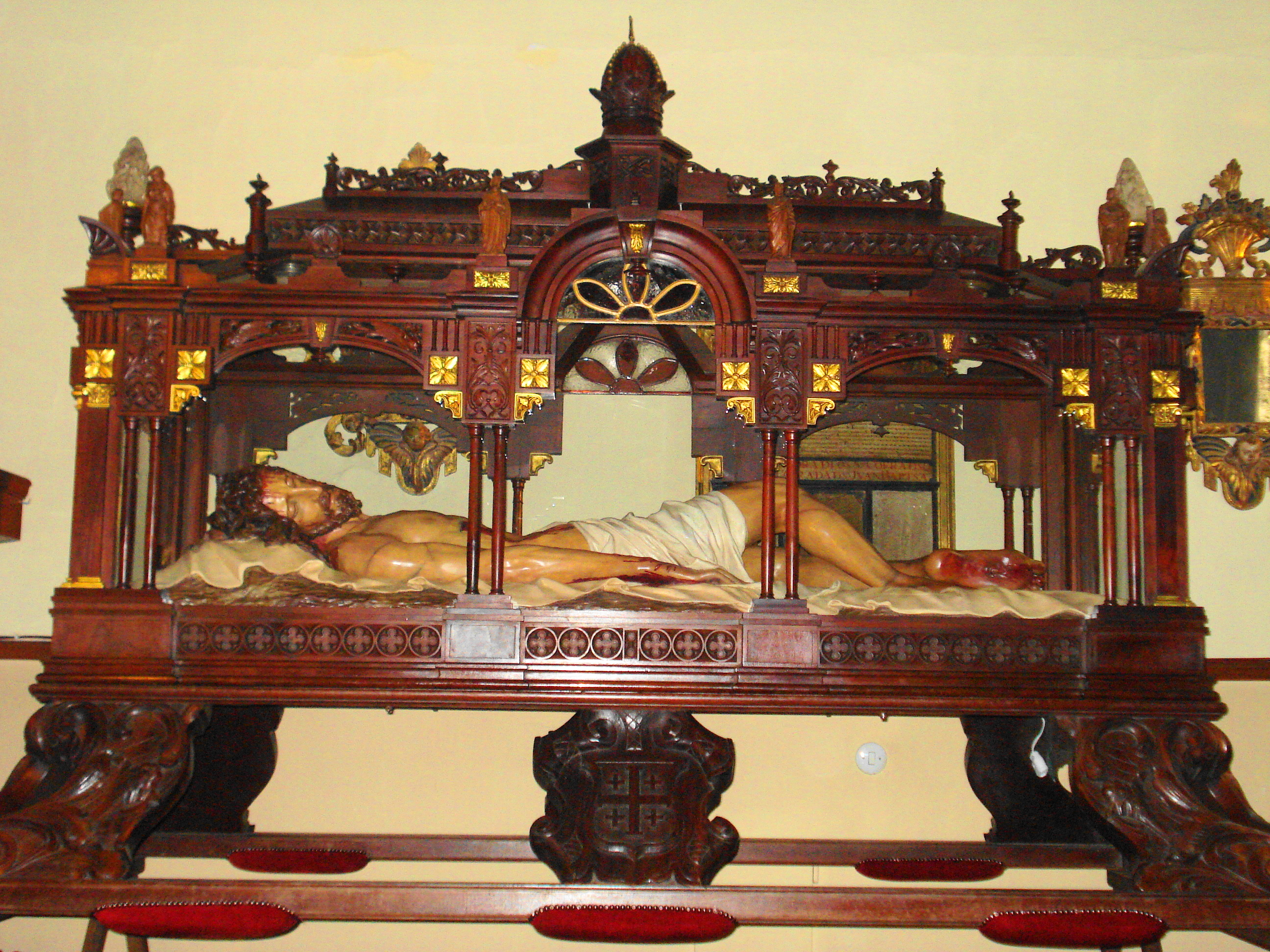 Santo Sepulcro de Palencia